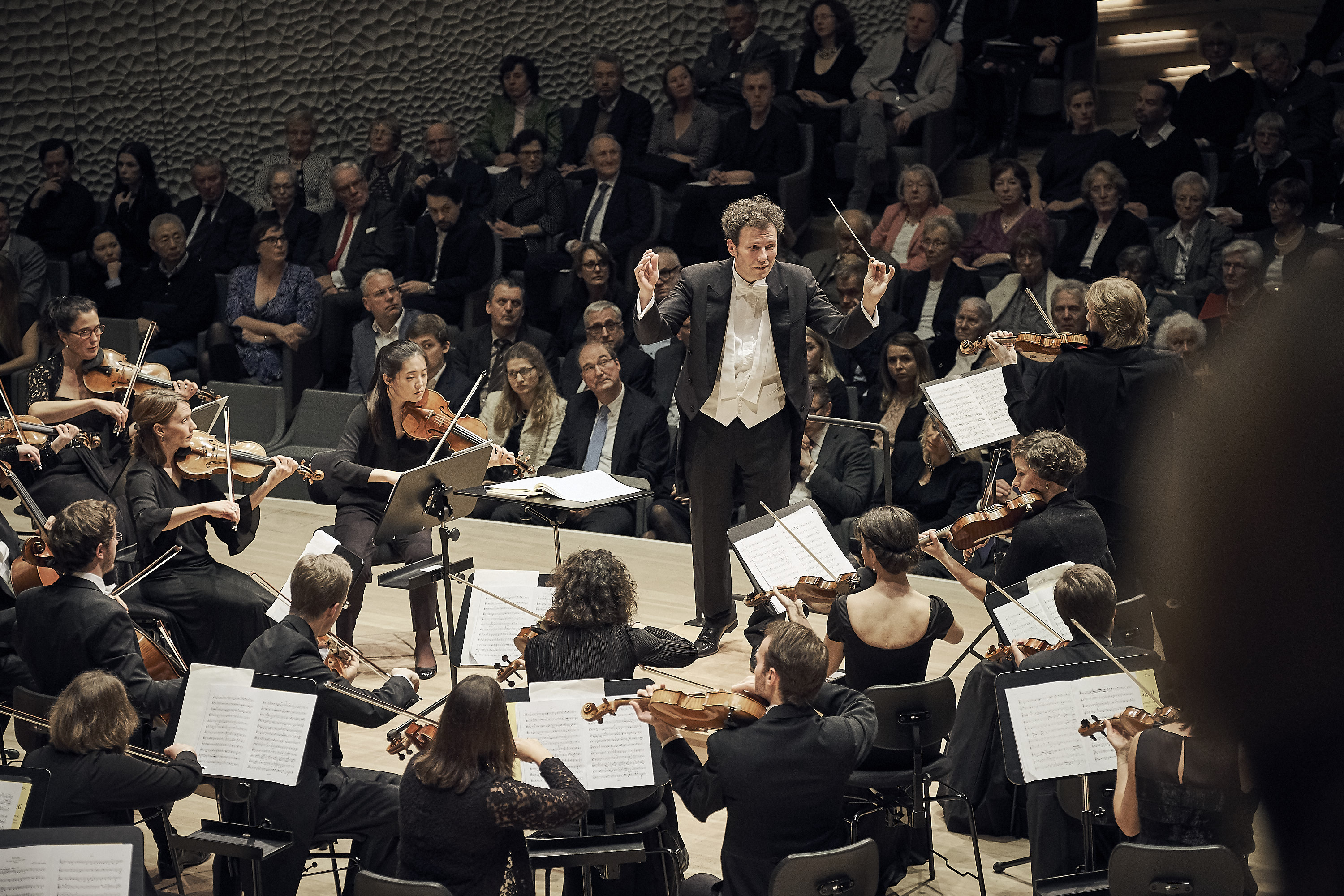 Debut der Hamburger Camerata in der Elbphilharmonie Hamburg am 14.11.2017 unter der Leitung von Simon Gaudenz